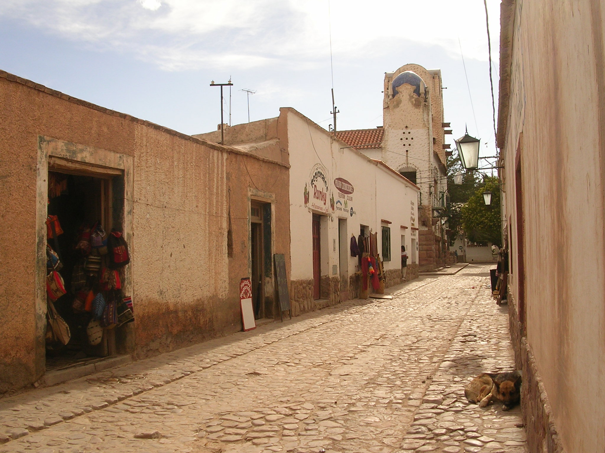 Calle de Humahuaca (NOA).